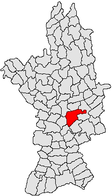 Categorie:Hărţi ale judeţului Olt